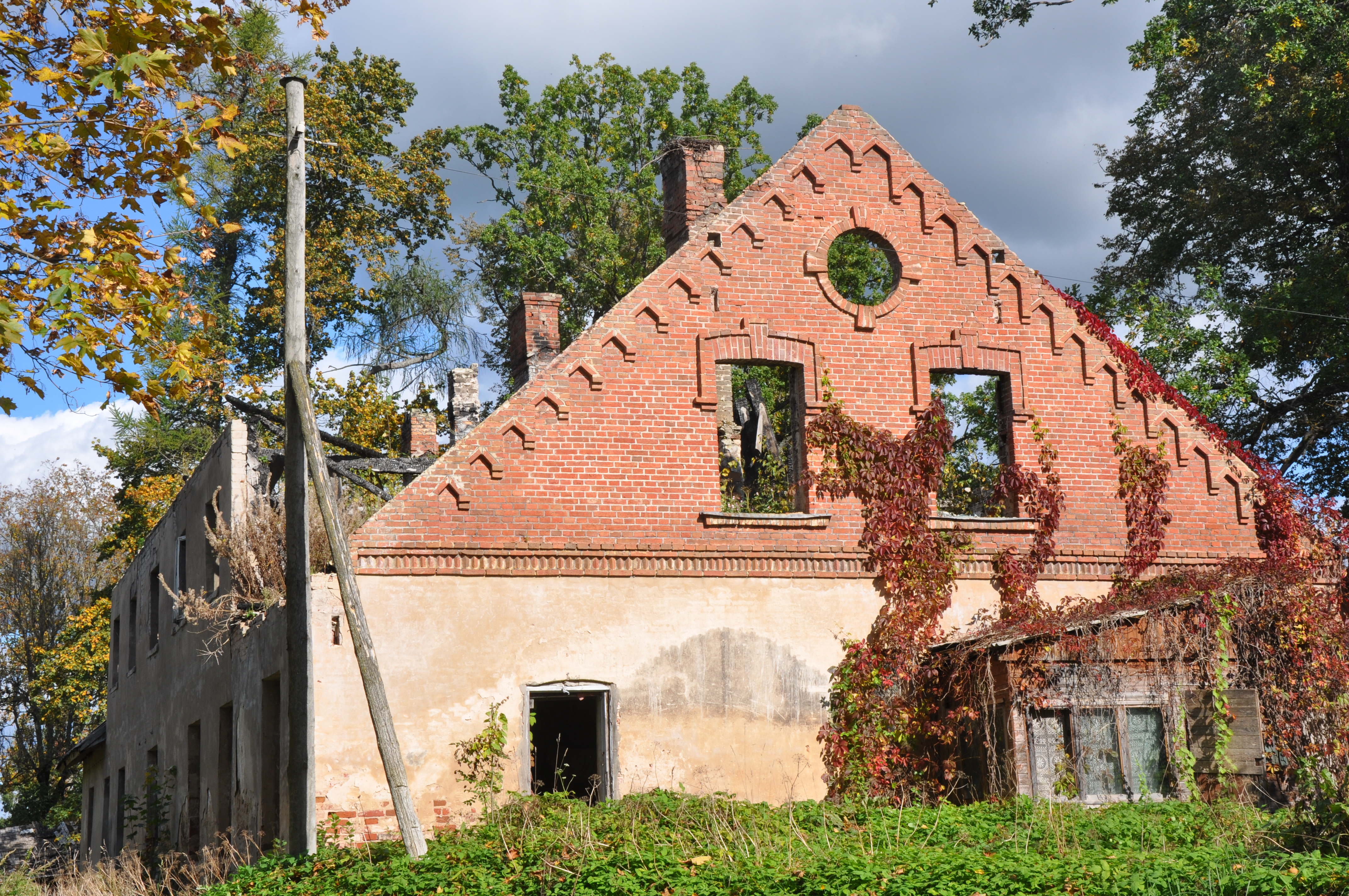 Vatrānes muižas kompleksa ēkas drupas, Vatrāne, Ķeipenes pagasts, Ogres novads, Latvia